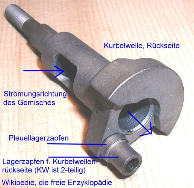 Glühzündermotor Kurbelwelle (Vorderteil)